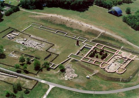 Ópusztaszer, Hungary, aerialphotography